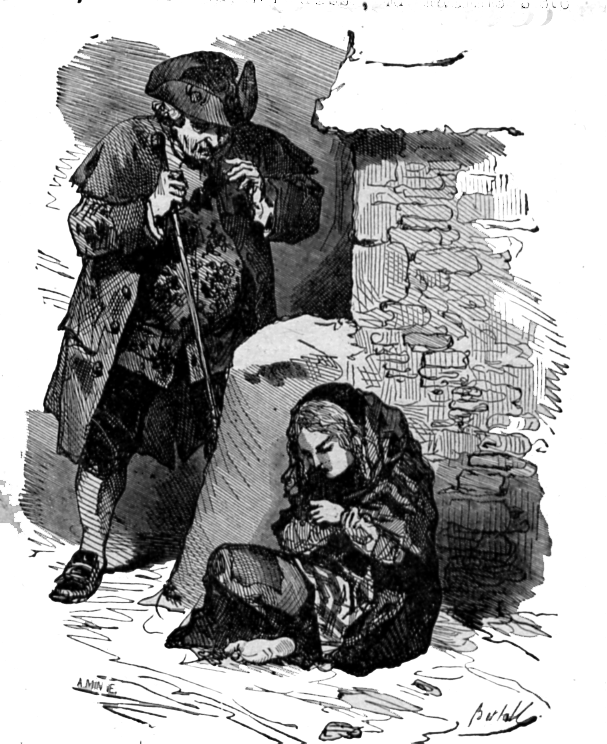 Pour la source voir : Discuter:Contes d'Andersen Vignette de La Petite Fille et les allumettes par Bertall représentant la petite fille.